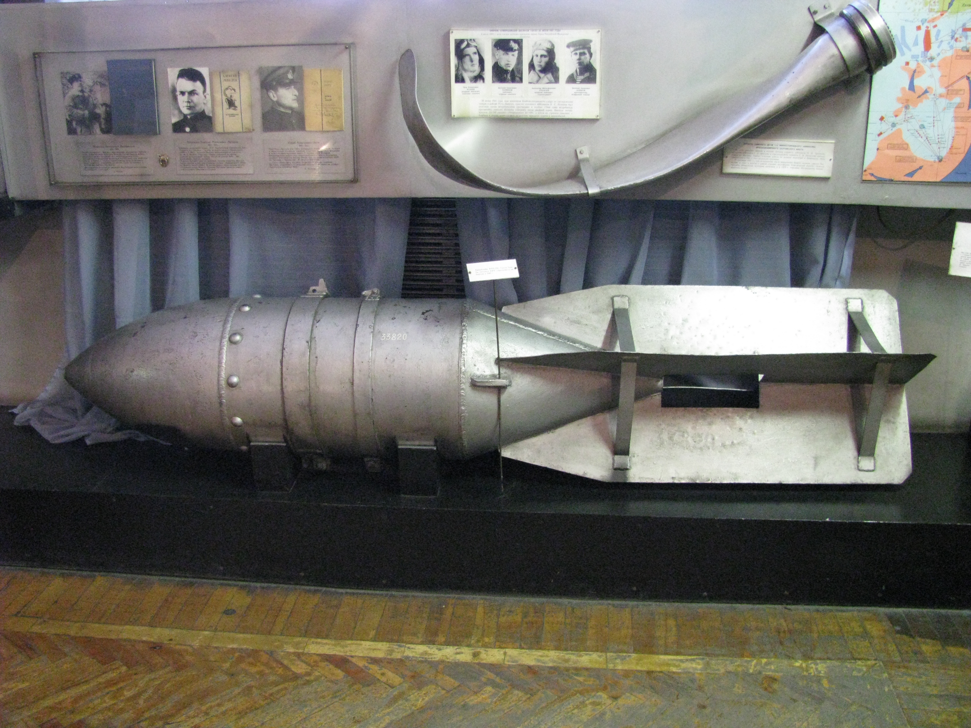 авиабомба ФАБ-250